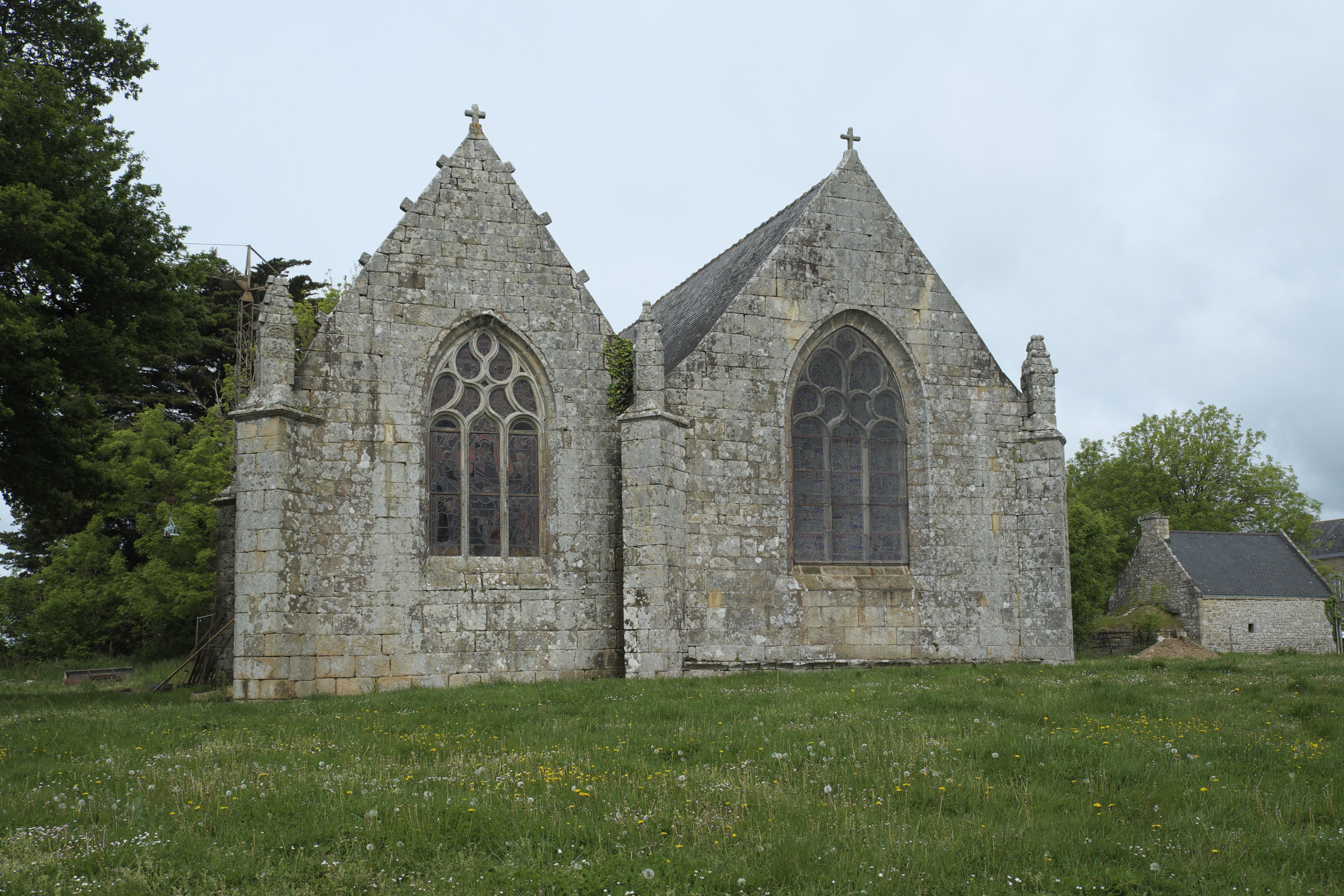 Kapelle Saint-Méen in Ploemel im Département Morbihan (Region Bretagne/Frankreich)